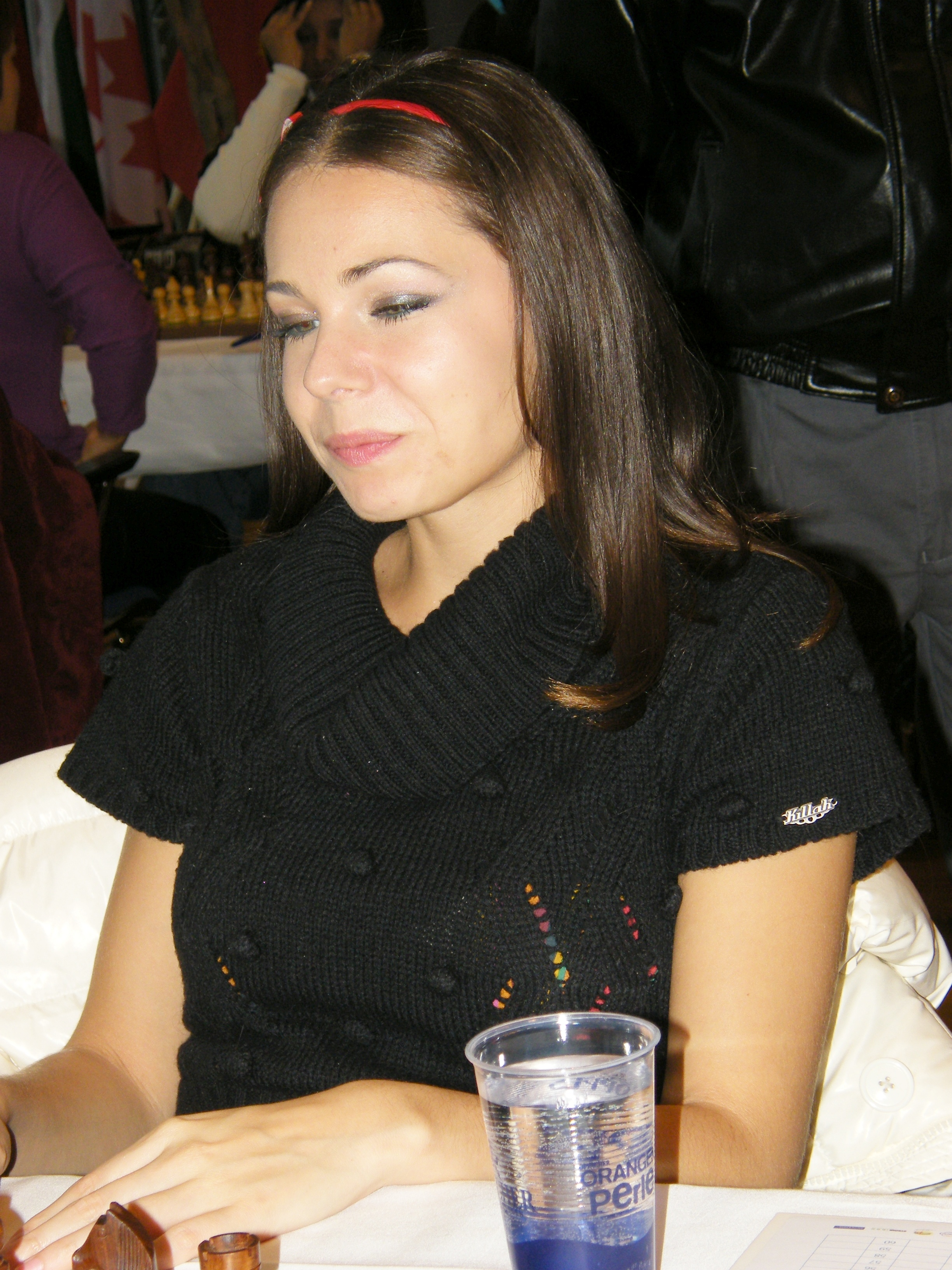 Ljilja Drijevic bei der 38. Schacholympiade in Dresden 2008